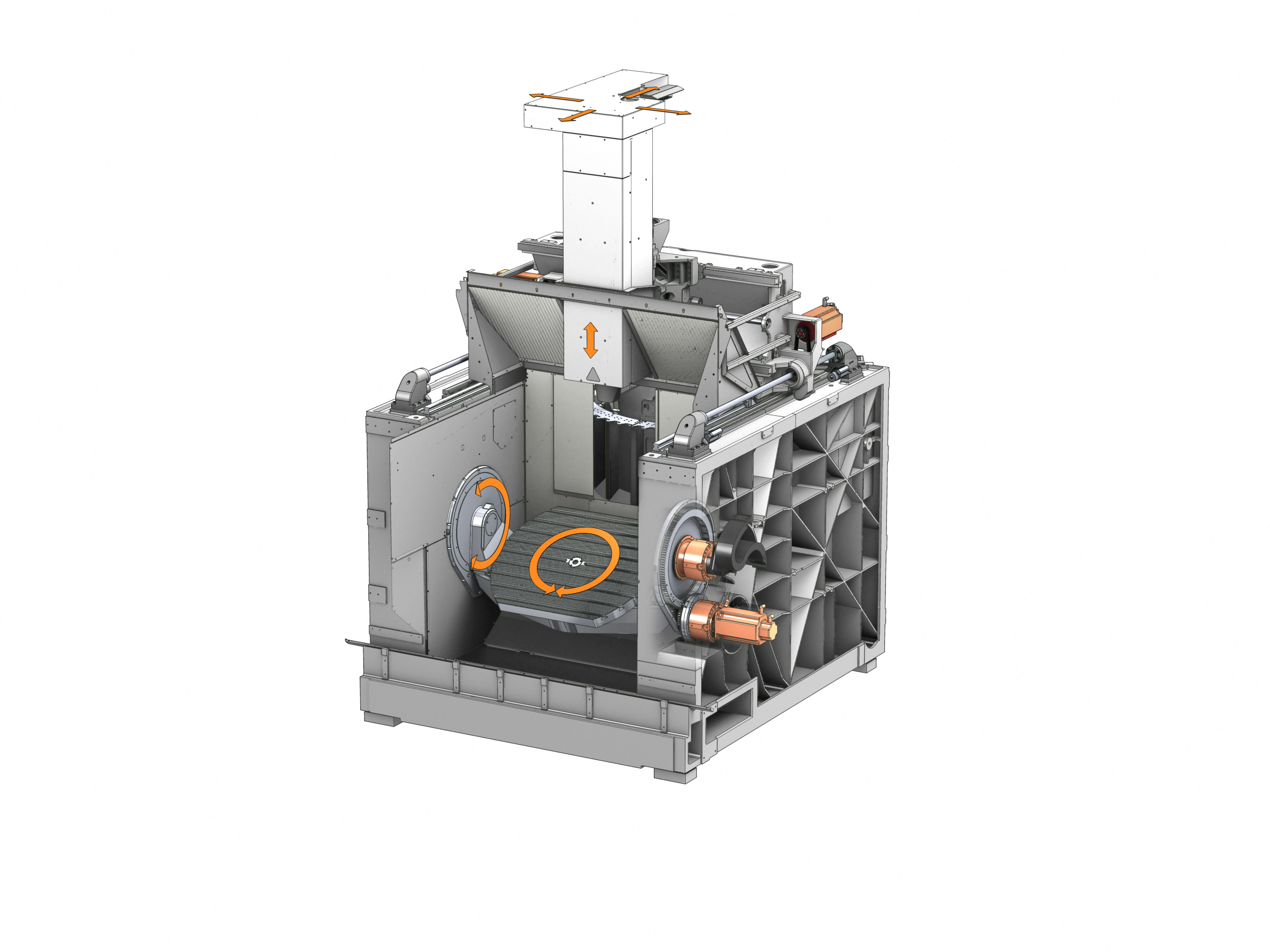 Bearbeitungszentrum, milling machine